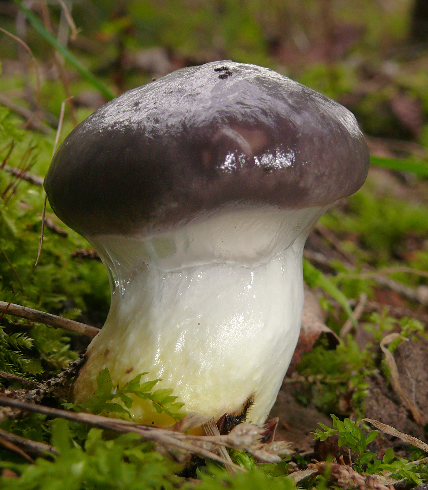 Gomphidius glutinosus, Schwäbisch-Fränkische Waldberge, Germany